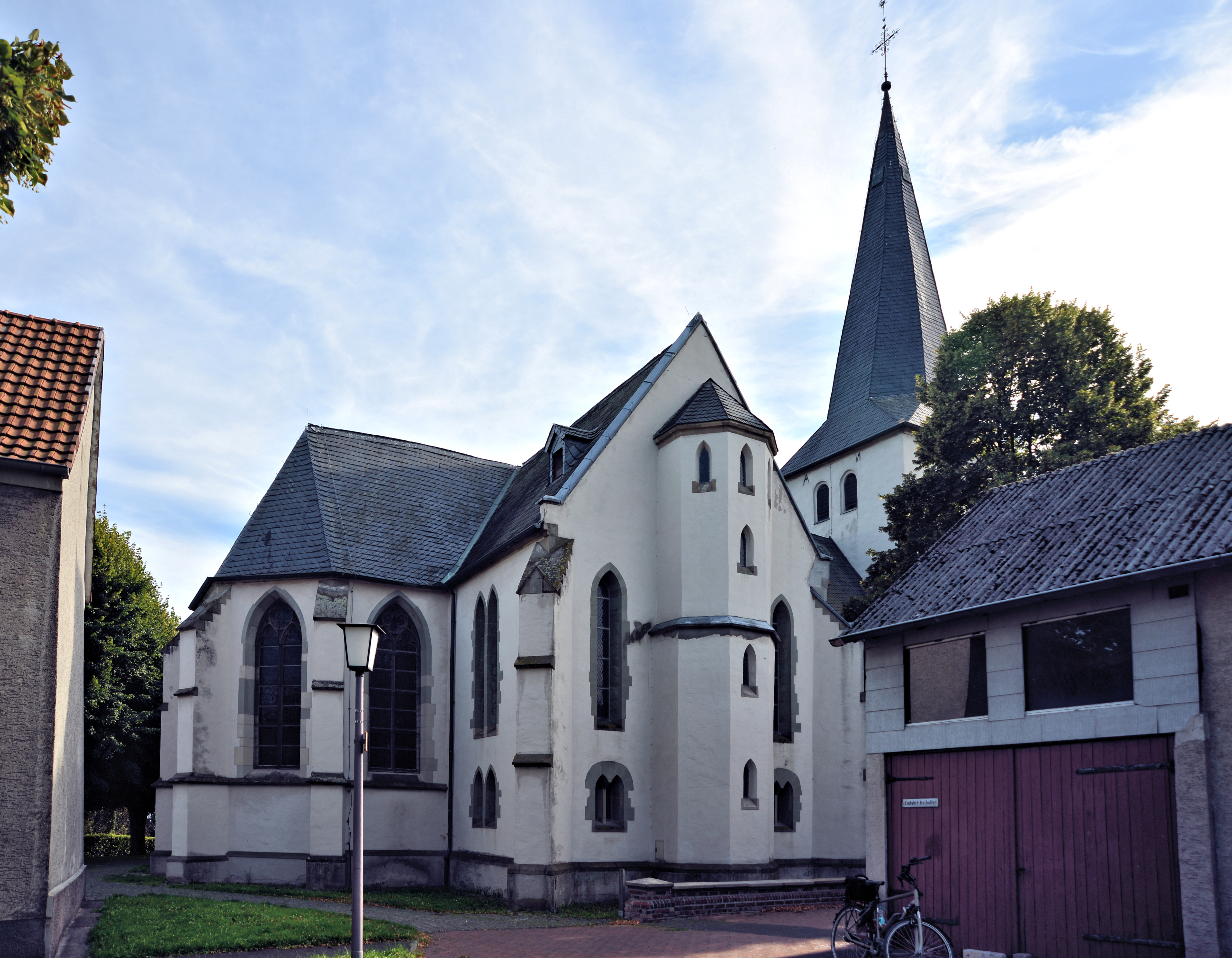 Ev. Kirche Unna-Lünern, Nordseite This is a photograph of an architectural monument.